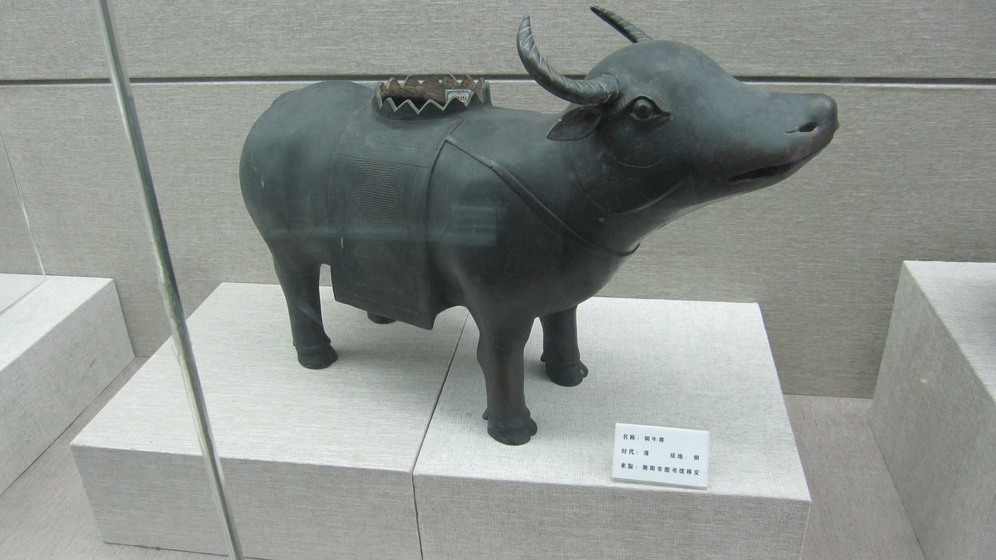 衡阳市博物馆展出的铜牛尊，清代文物，衡阳市图书馆移交。